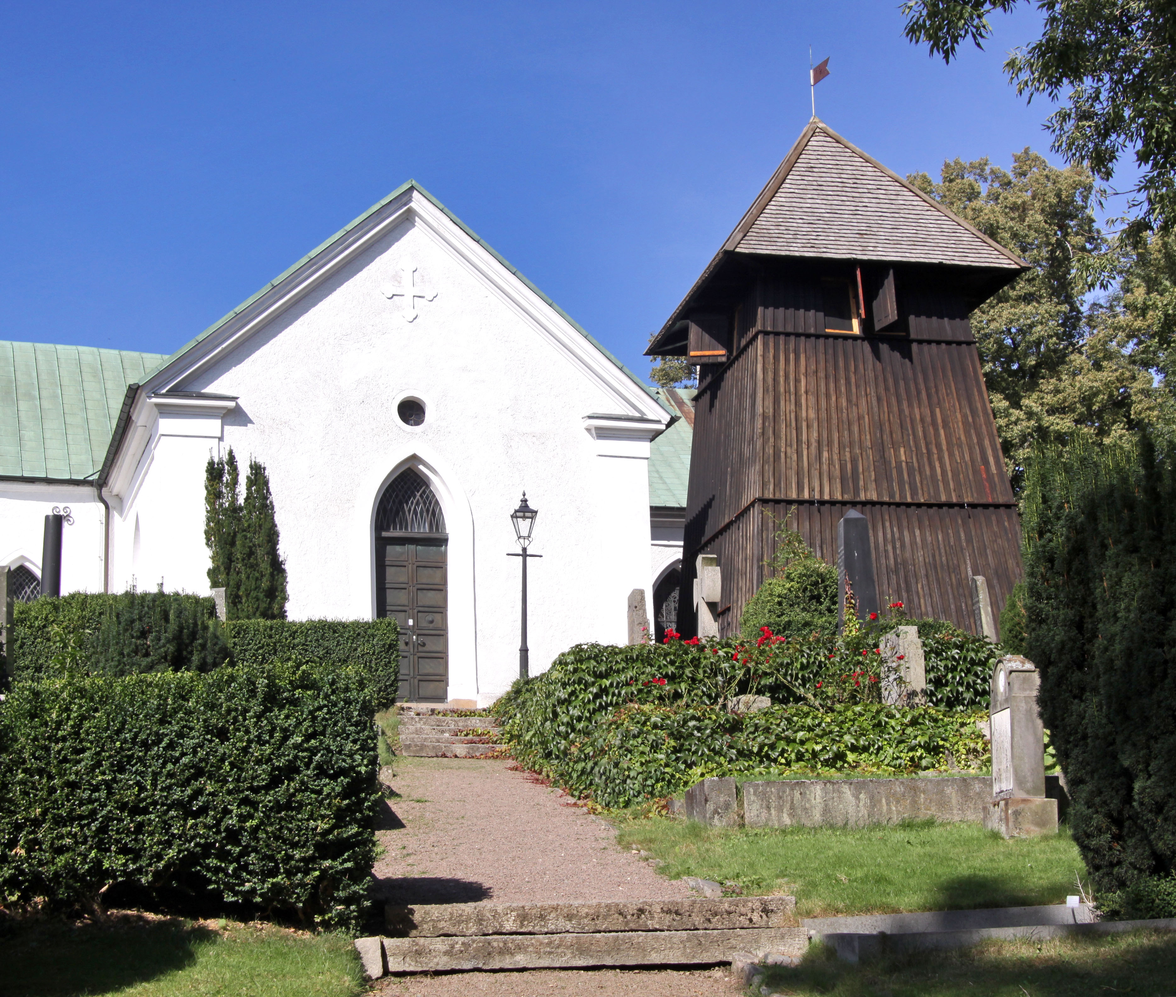 Helsingborg. Raus Kyrka.